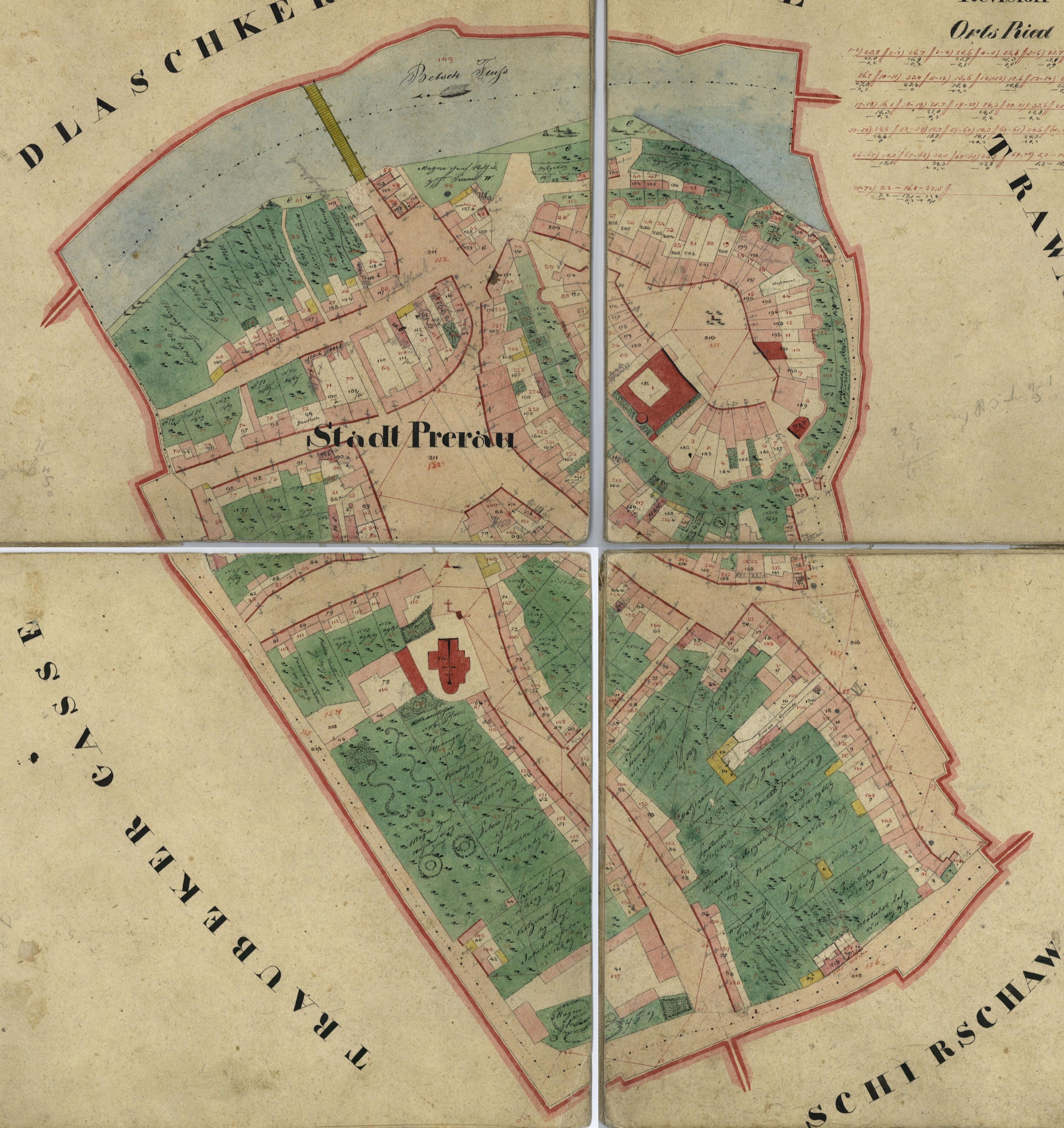 Indikationsskizze: Prerau